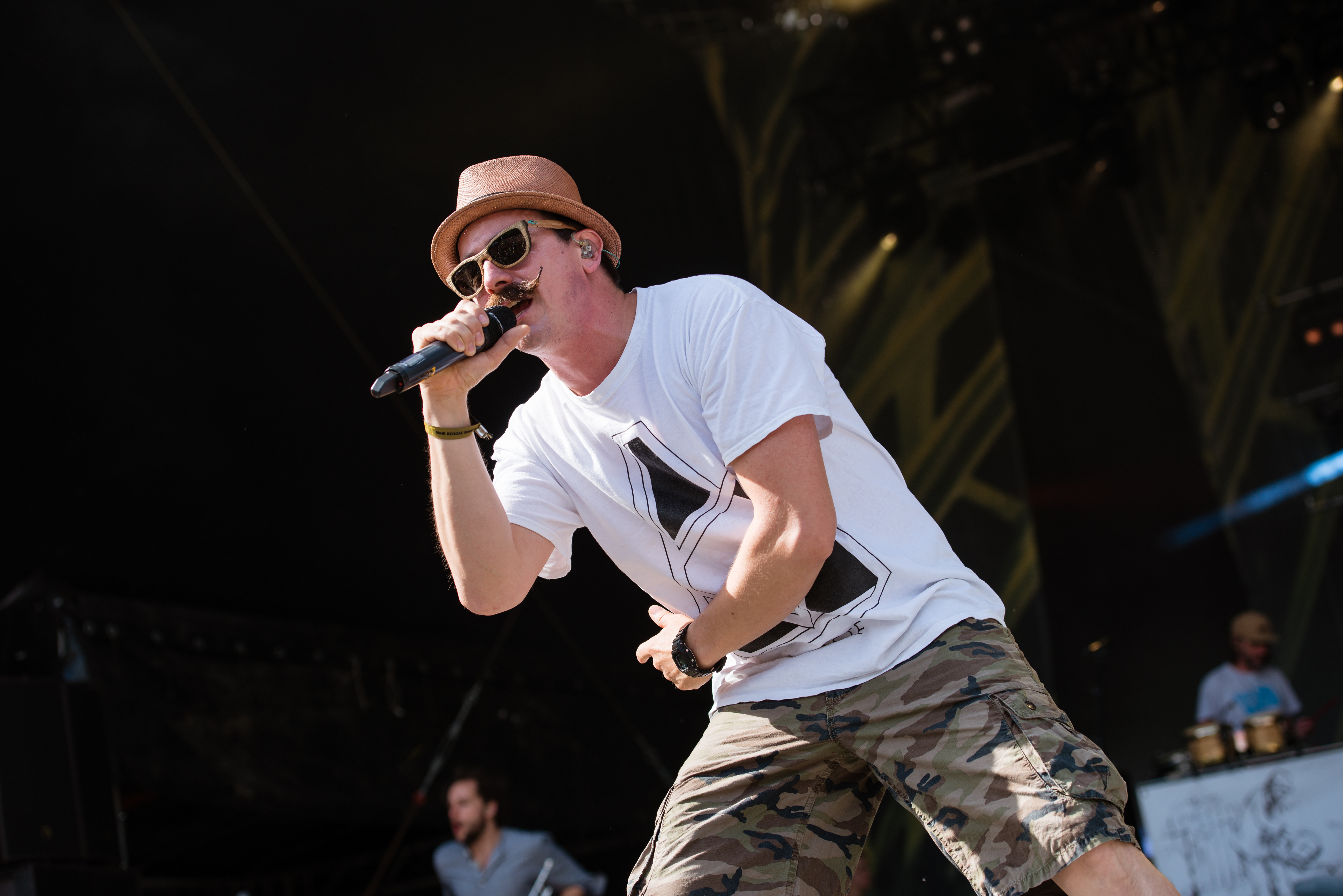 'Ruhr Reggae Summer 2014 - Dortmund': 'Jamaram'